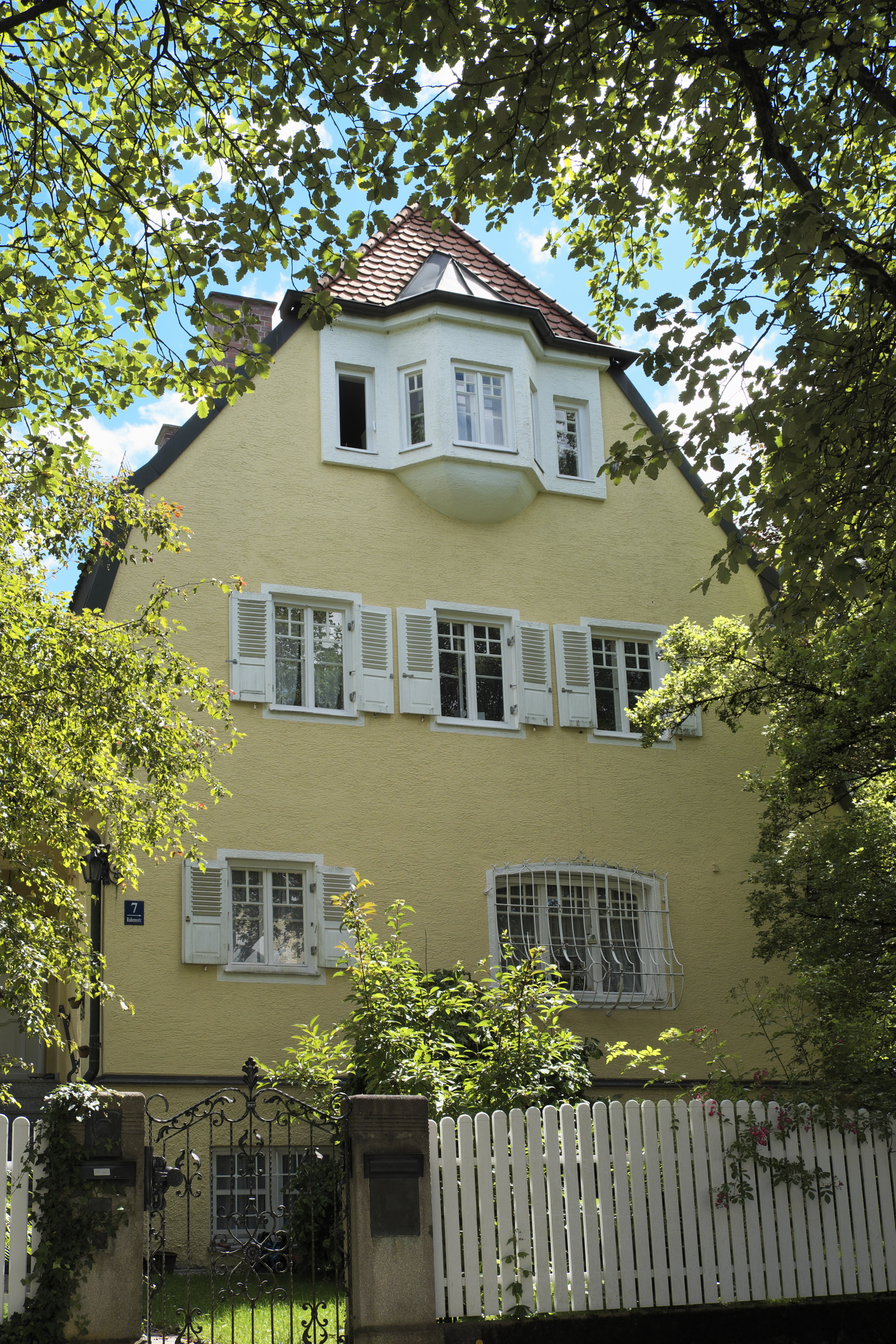 Villa in der Rubensstraße 7 in Obermenzing im Stadtbezirk Pasing-Obermenzing in München (Bayern/Deutschland), um 1912 von Johann Schalk errichtet